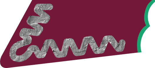 Łapka artylerii na kołnierz kurtki w latach 1949 -1952